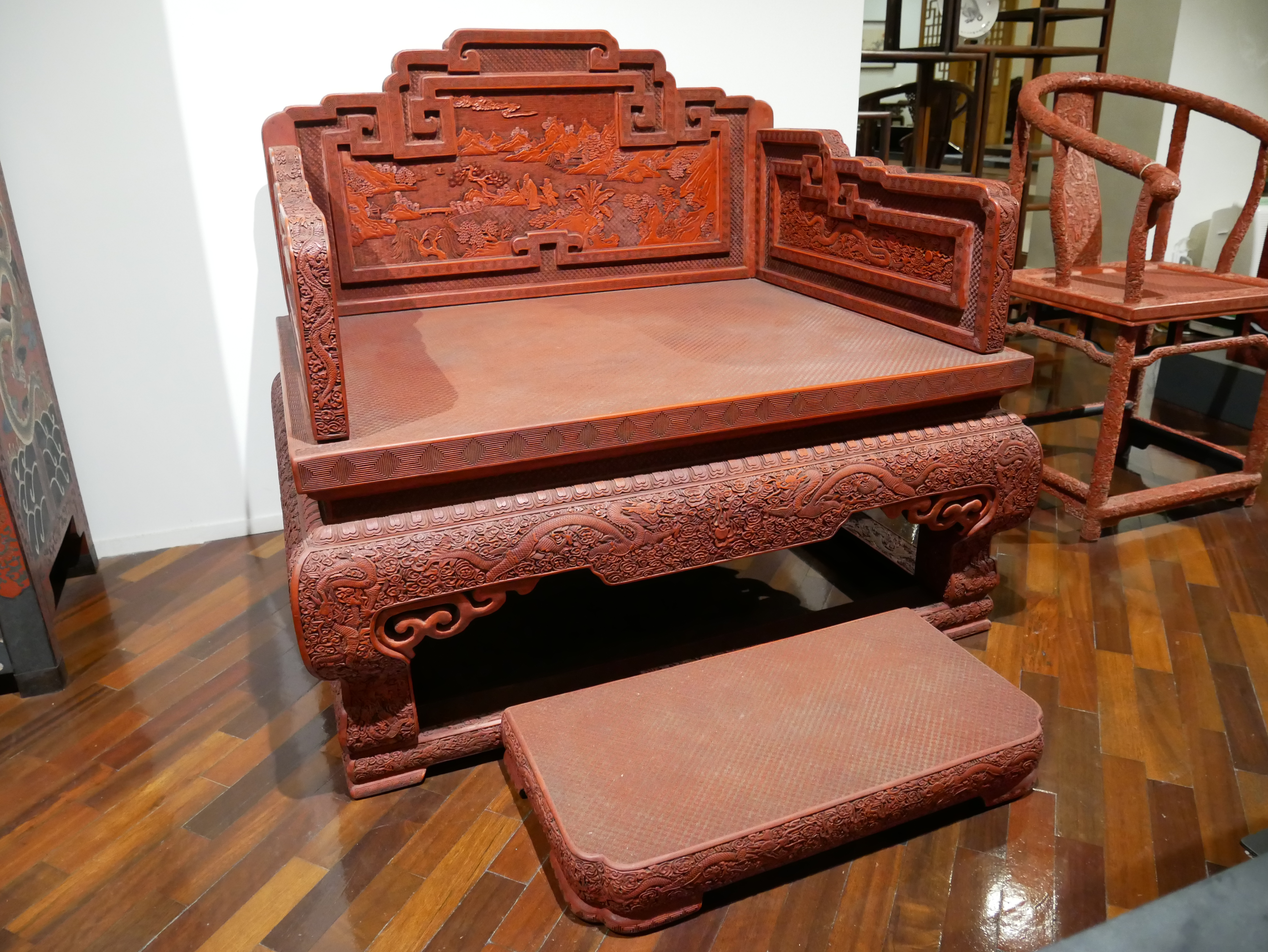 雕漆帶托泥寶座，桃園市桃園區市中次分區光興里